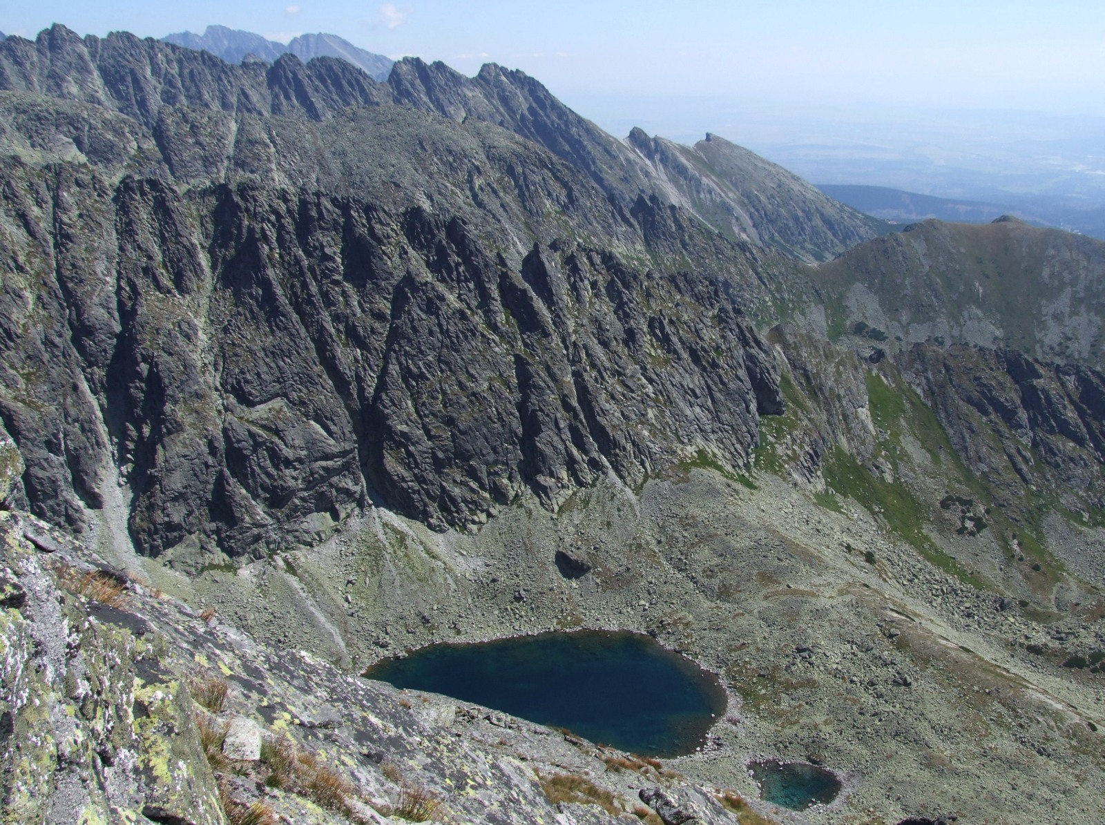 Zielony Staw Ważecki i Mały Staw Ważecki